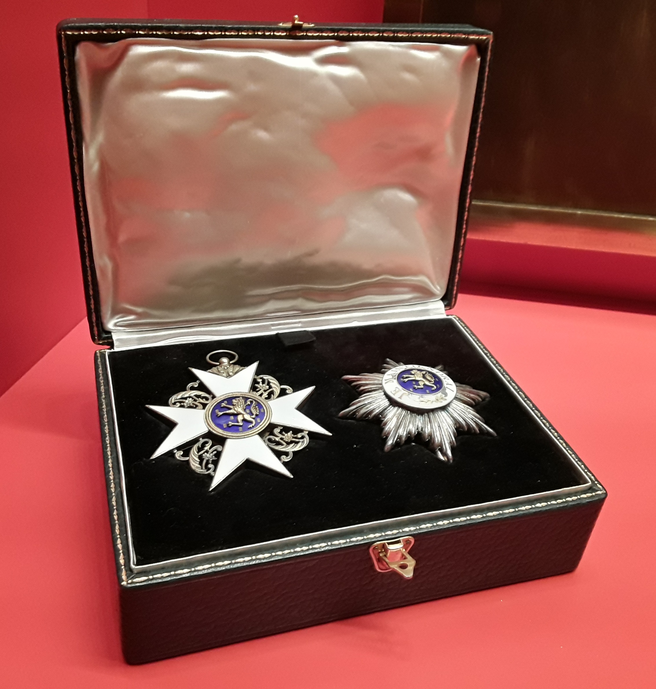 Ordre du Lion d'Or de la Maison de Nassau: le bijou (à gauche) et la plaque. (exposé au Musée national d'histoire et d'art à Luxembourg)